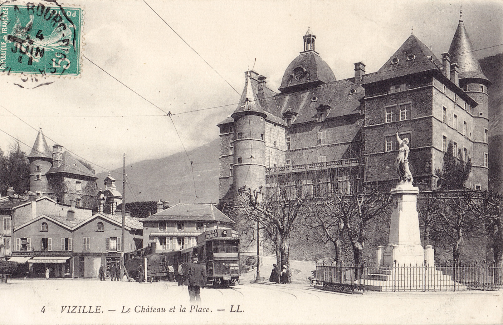 Carte postale ancienne éditée par LL, n°4 :VIZILLE - Le Château et la Place.Locomotive 040T Pinguely et motrice à chassis Brill.